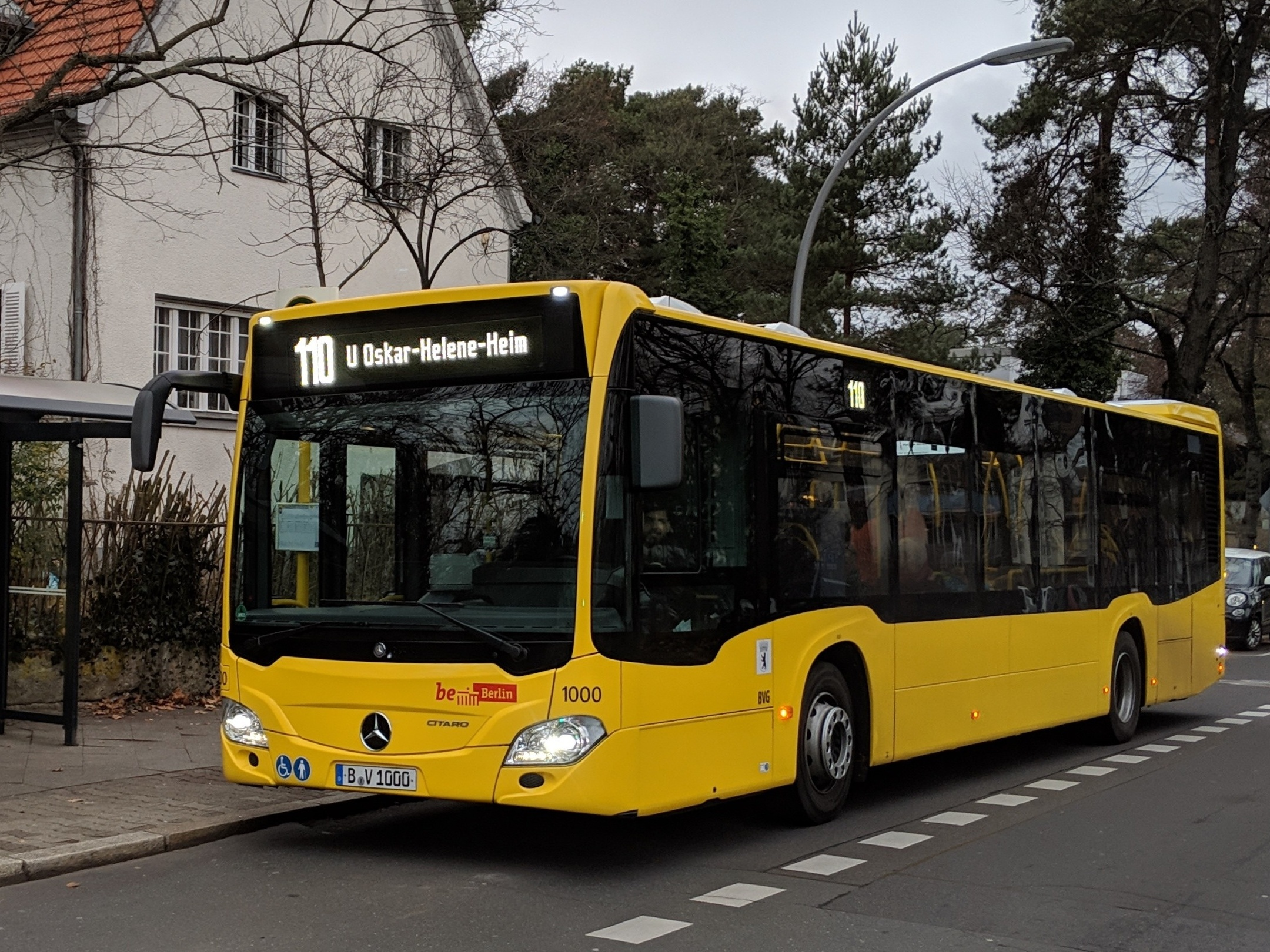 Neuester Eindecker Niederflur bei den Berliner Verkehrsbetrieben Mercedes Benz C2 EN18